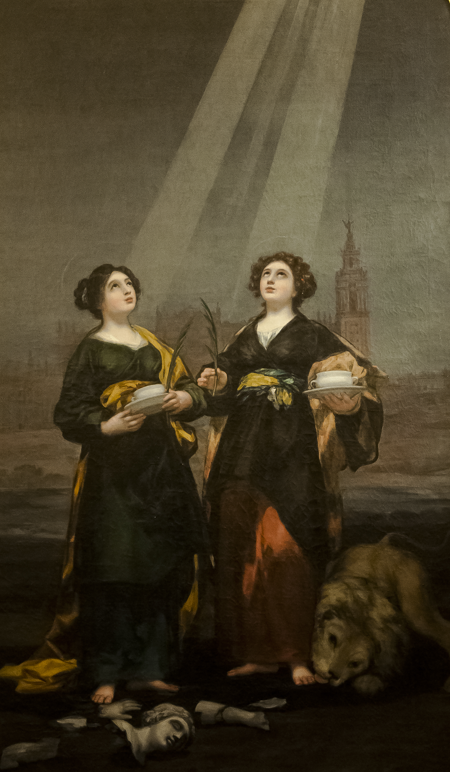 Francisco Goya (1746-1828) - Heiligen Justa en Rufina - kathedraal Sevilla